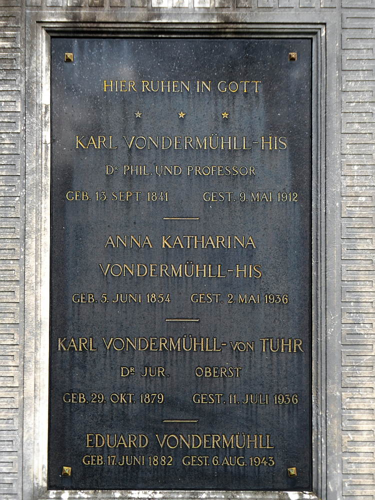 Karl von der Mühll-His (1841–1912) Dr. Phil., Professor, Grabinschrift auf dem Friedhof Wolfgottesacker, Basel